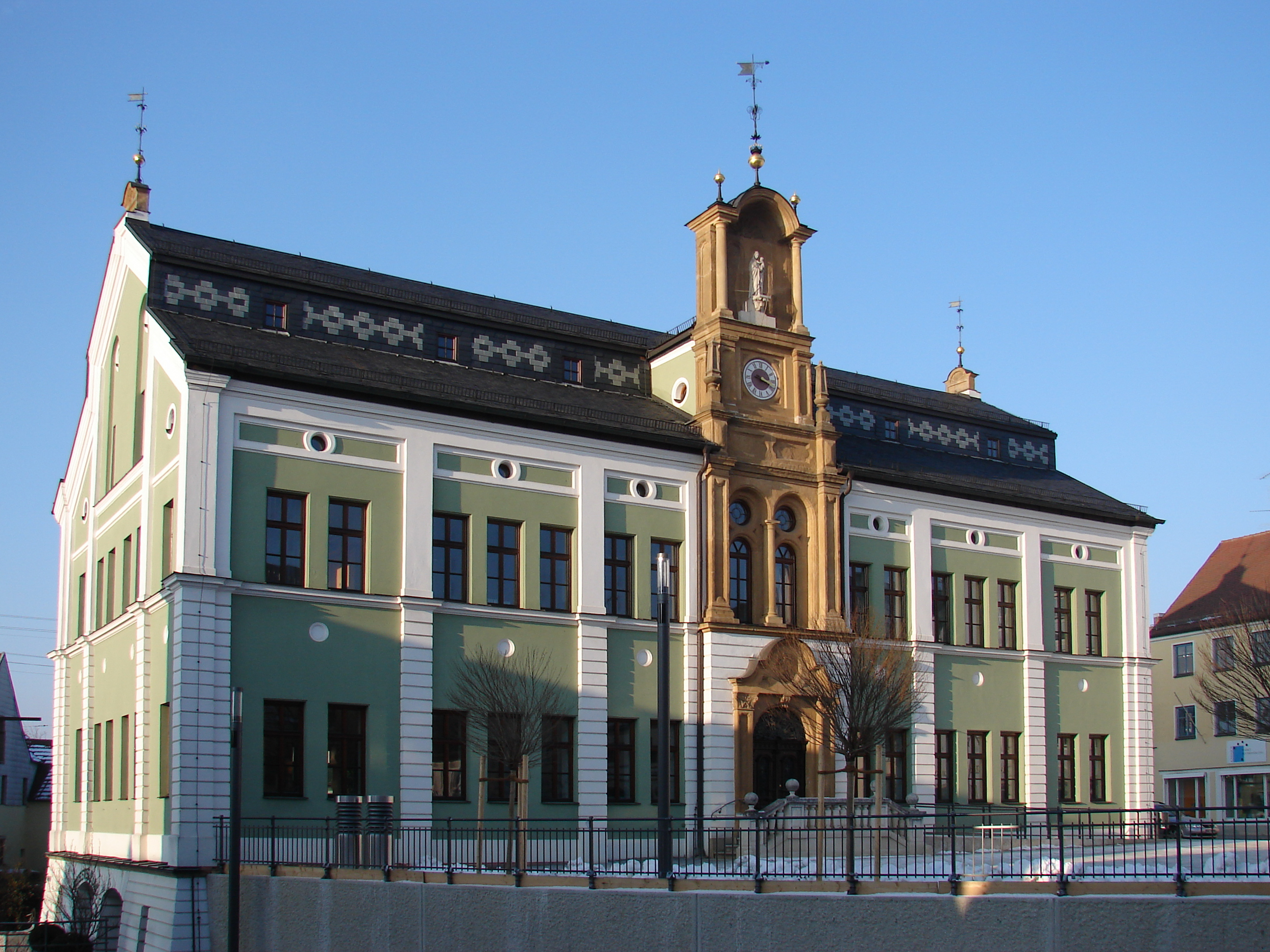 Wolnzacher Rathaus am Marktplatz